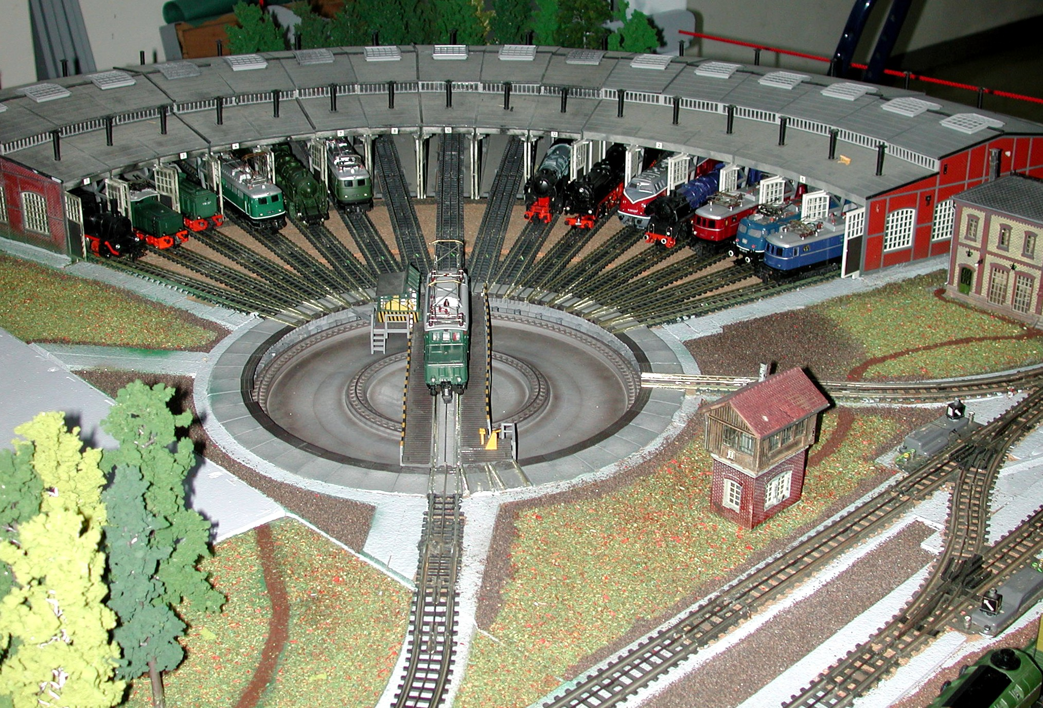 Trix Express Anlage im Stil der 1960er Jahre mit Gleisprofilen aus Weißblech und Schwellen aus gepresster Pappe. Original Fleischmann Drehscheibe für Trix Express umgebaut. Im Ringlokschuppen steht nahezu das gesamte Sortiment an Trix-Lokomotiven, die seinerzeit auf dem Markt waren. Auf der Drehscheibe steht die E-94, hier bereits in Gleichstromausführung. Foto: Michael Linnenbach 13:14, 14. Feb 2006 (CET)